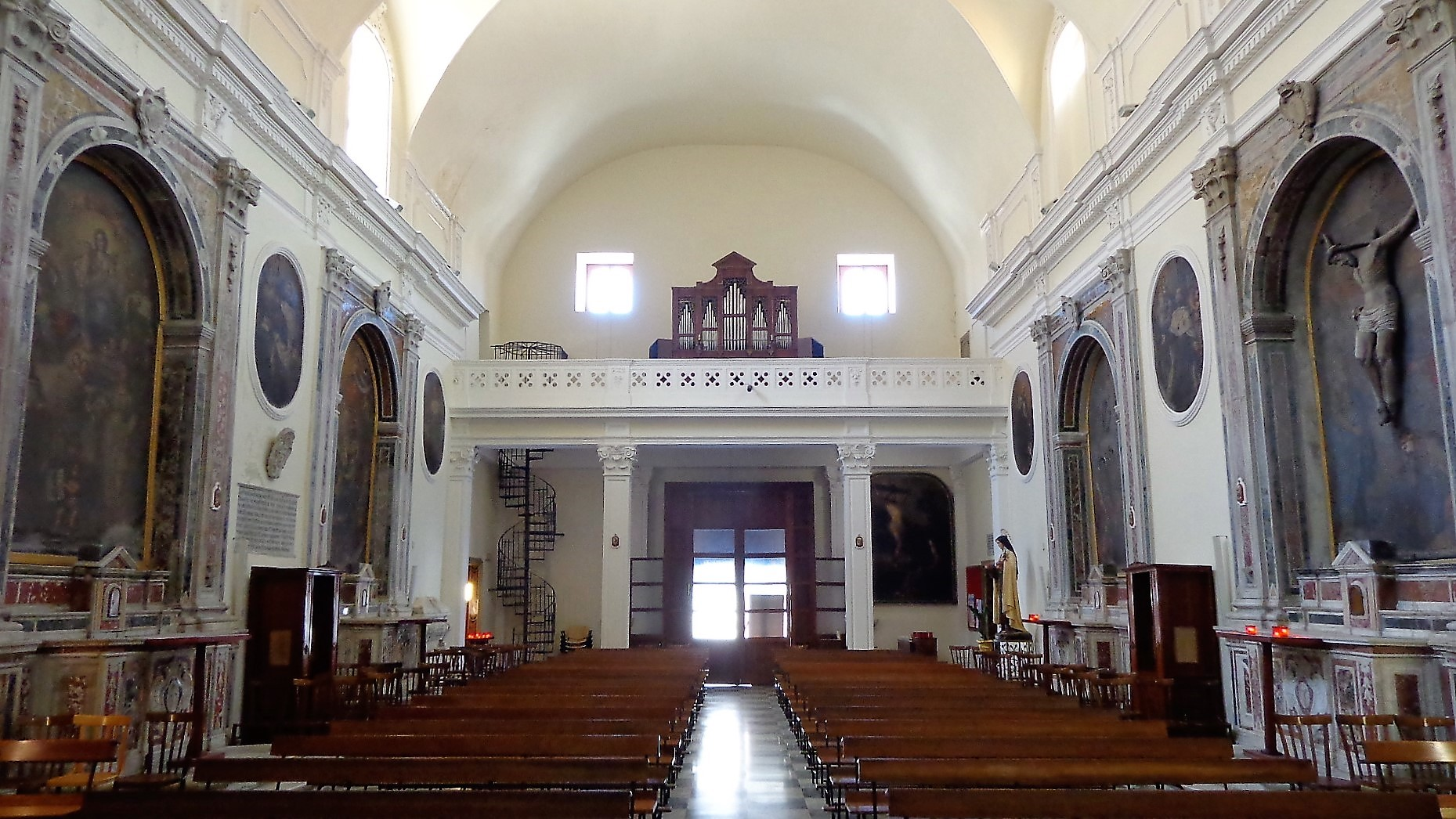 Controfacciata